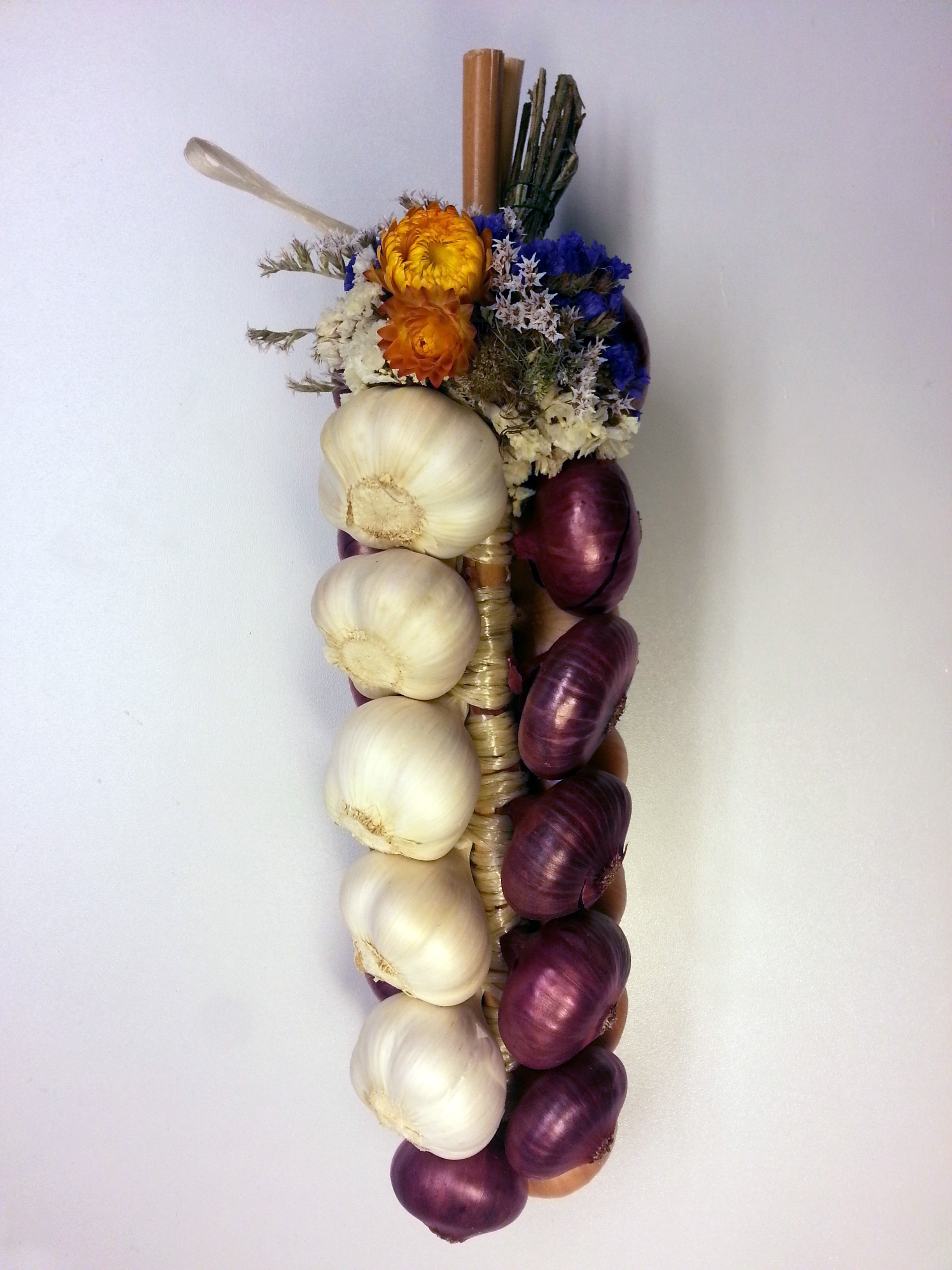 "Zopf" of Onions and Garlic. Onions Market in Berne, Switzerland. (Zibelezopf Zibelemaerit Bern)